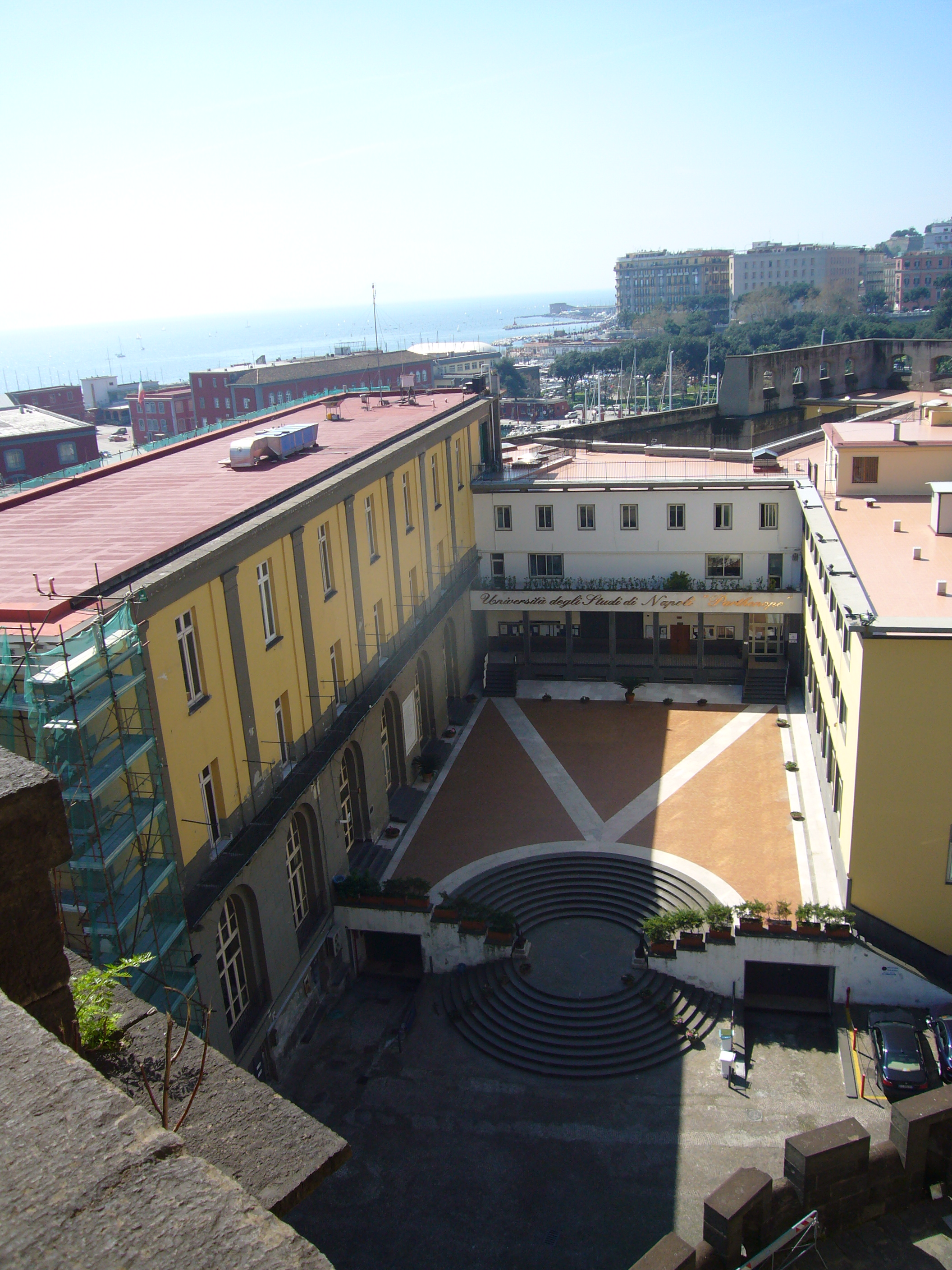 Napoli, Università degli Studi "Parthenope": cortile dalla terrazza del Castel Nuovo